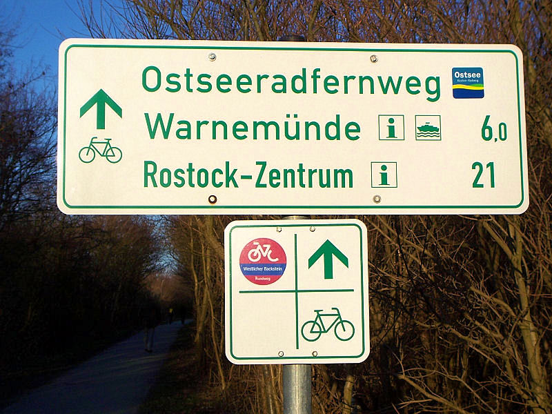 Wegweiser für den Ostseeküstenradweg in Rostock